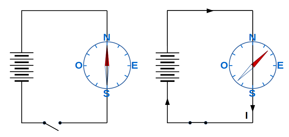 Experiment d'Oersted. Una bateria proporciona un corrent elèctric d'intensitat I que circula per un conductor amb una secció orientada nord-sud just damunt una brúixola. Quan passa el corrent l'agulla magnètica es desvia cap el nord-est si la intensitat circula de nod a sud.